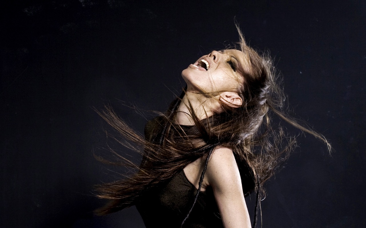 Photo von Bella Wagner von Julia Wesley